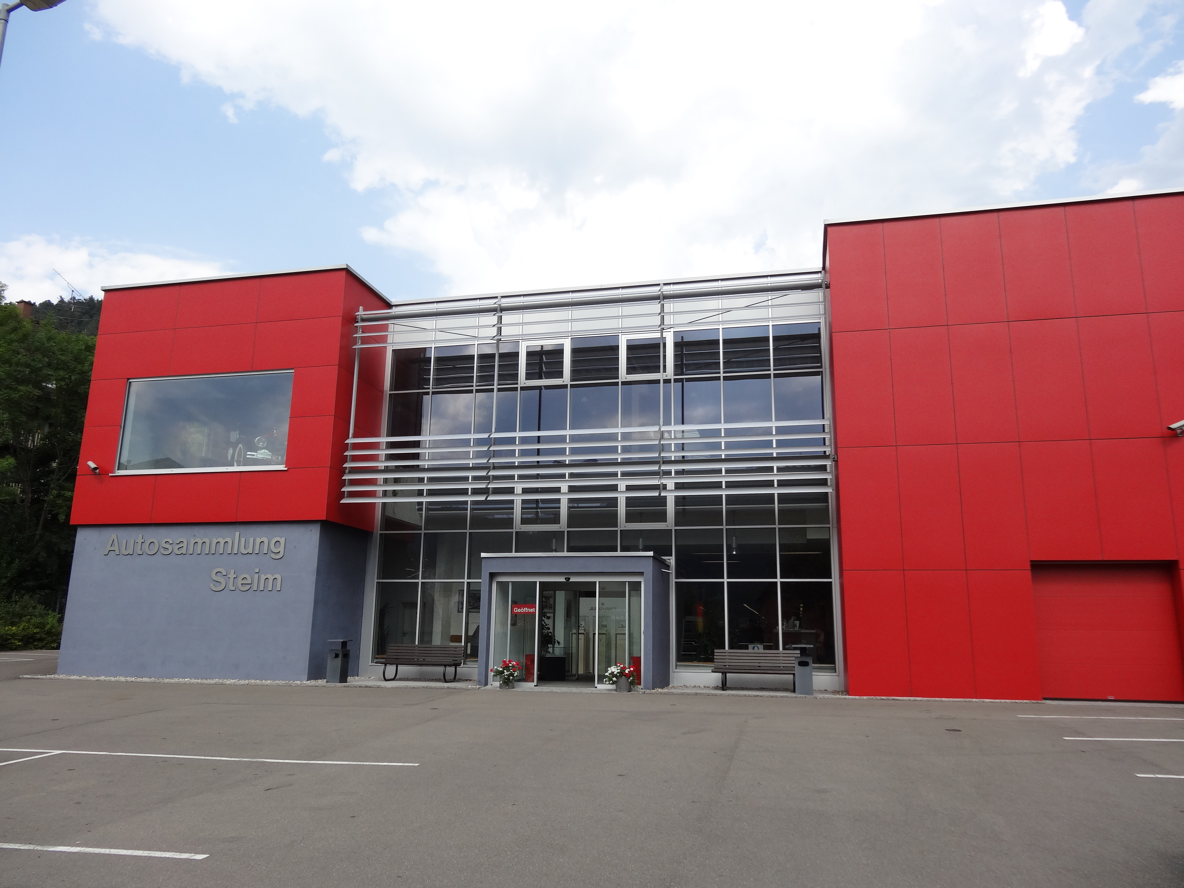 Autosammlung Steim - Schramberg 002